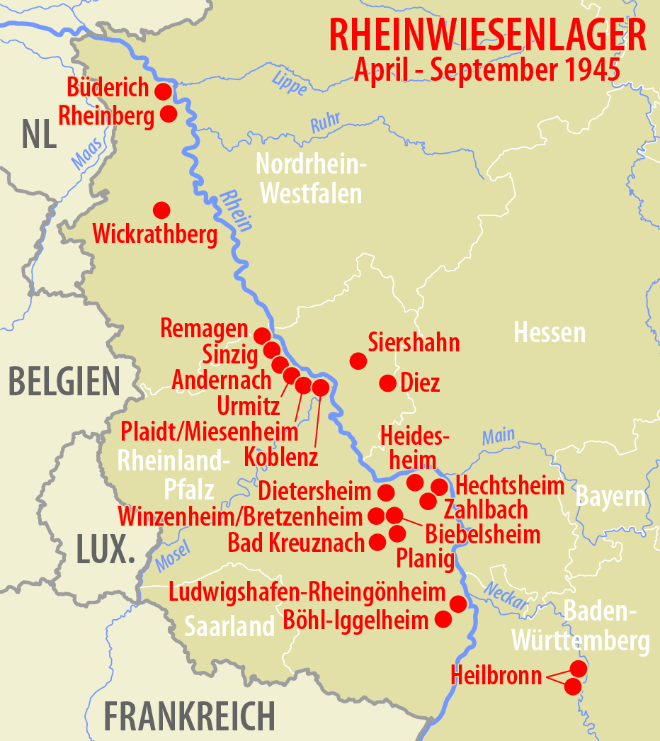 Karte der RRheinwiesenlager